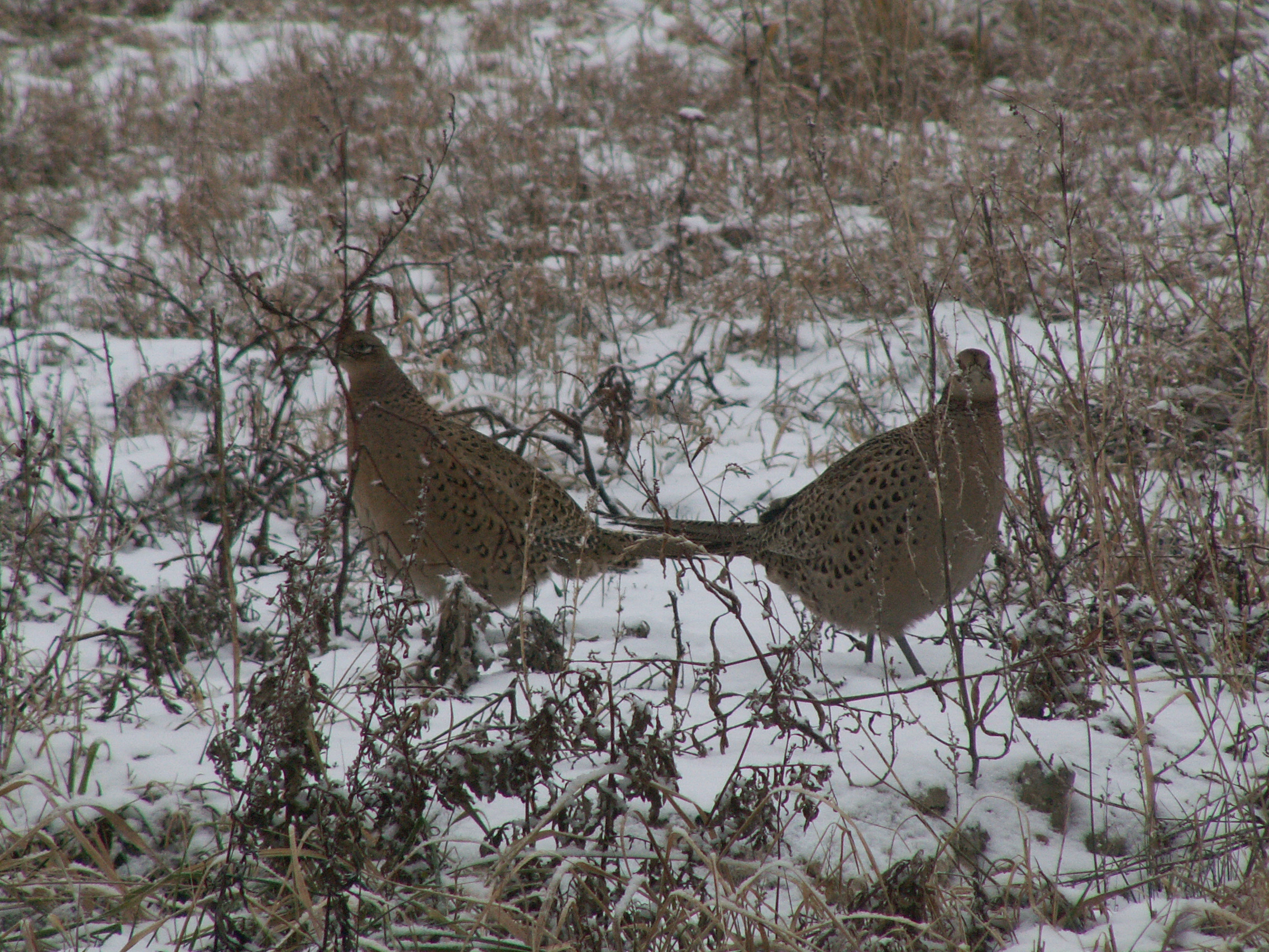 Samice bażanta